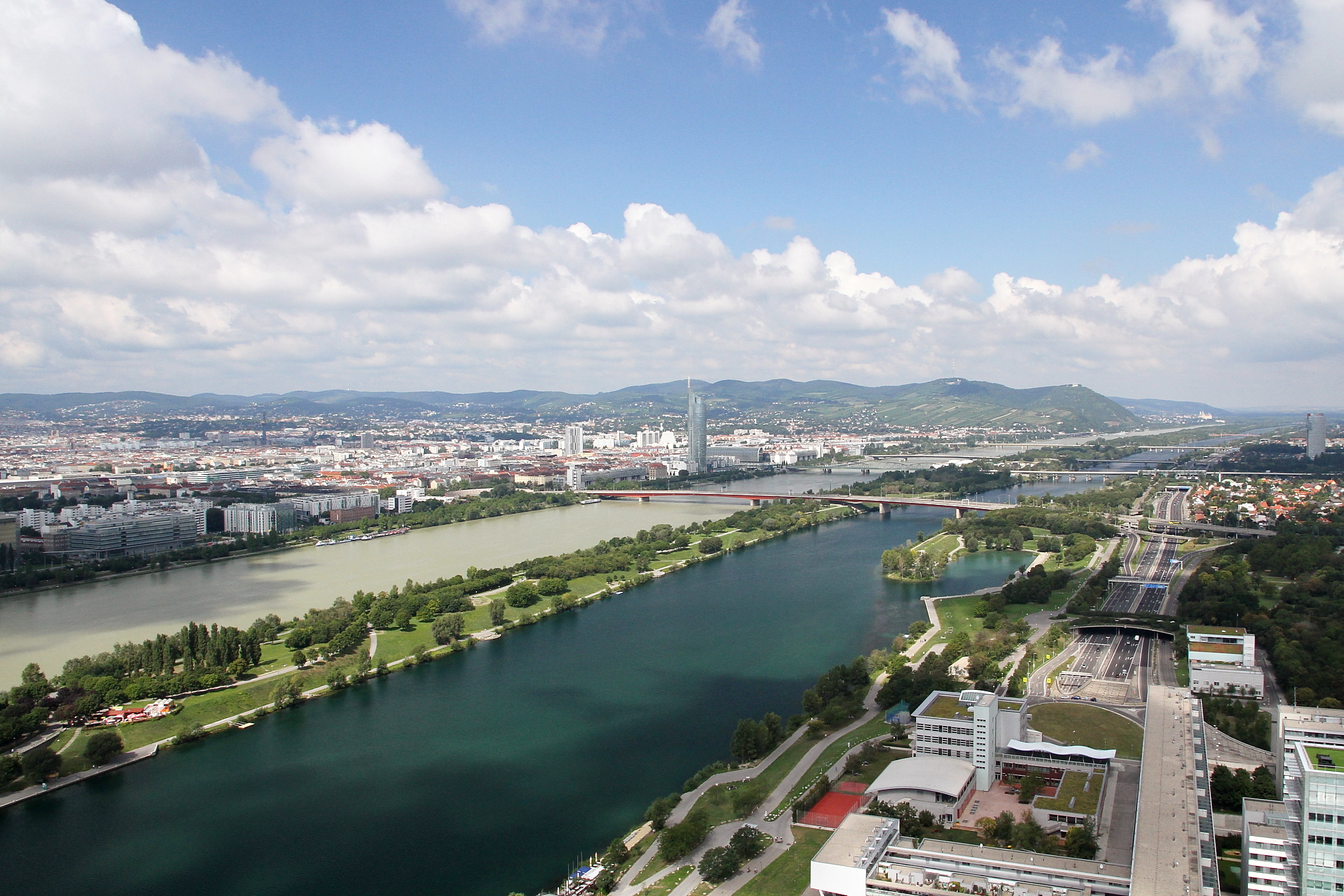 Blick vom DC Tower über Wien in Richtung Nordwest. Von Links nach Rechts: Donau, Donauinsel, Neue Donau und die Donauufer Autobahn im Bereich zwischen Kaisermühlen und Floridsdorf. Im Bildzentrum der Millennium Tower und davor die Brigittenauer Brücke.